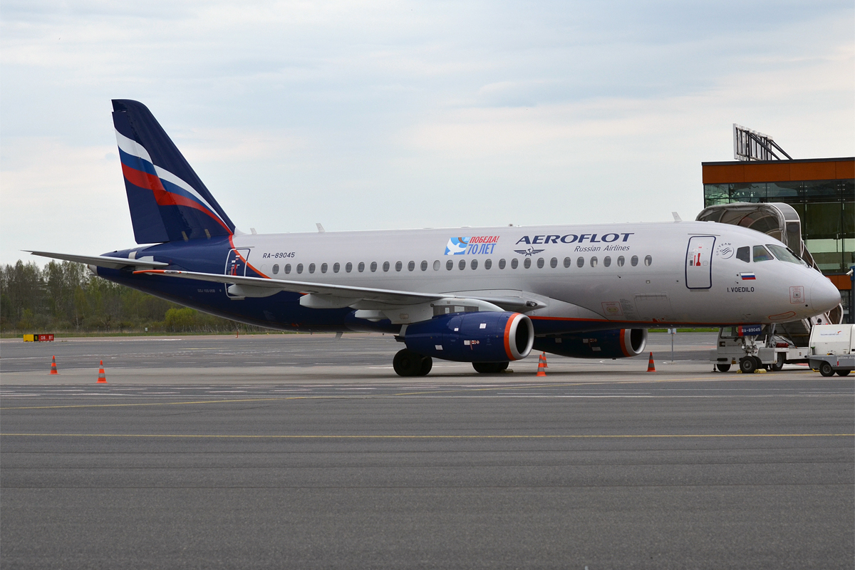 Aeroflot, RA-89045, Sukhoi Superjet 100-95B